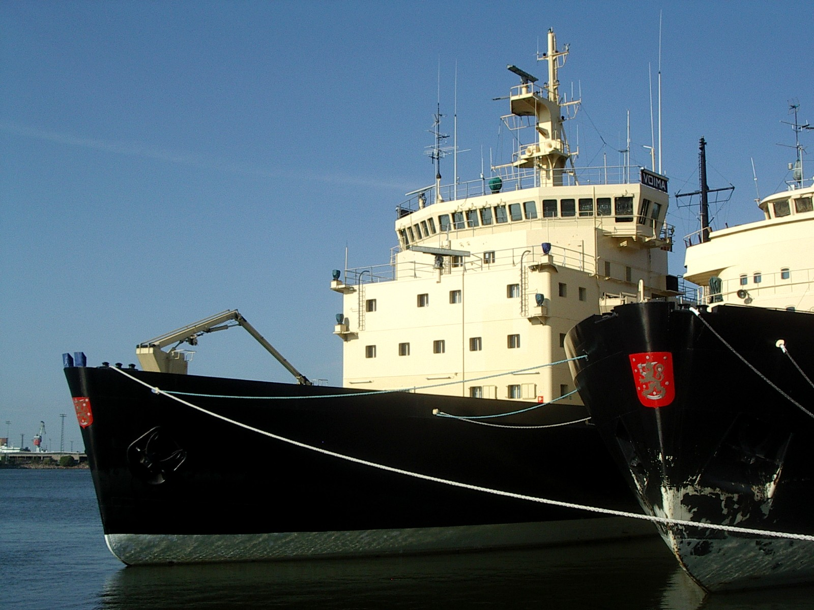 Jäänmurtaja Voima Katajanokalla kesällä 2006.